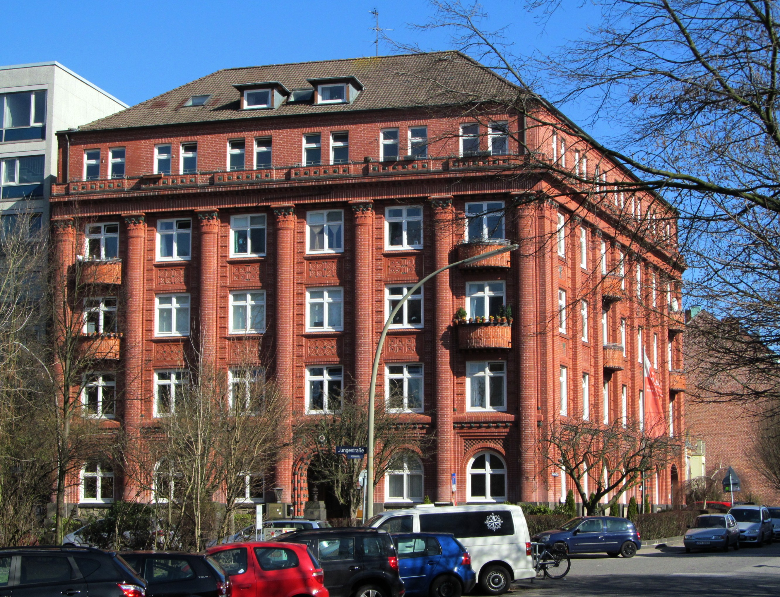 ehem. Haus des Allgemeinen Deutschen Bauarbeiterverbandes, heute IG BAU, erbaut 1910/11 von Albert Krüger This is a photograph of an architectural monument.